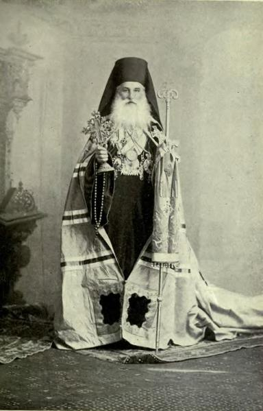 El arzobispo ortodoxo serbio Inocencio, que presidió el casamiento de Alejandro y Draga de Serbia en 1900.